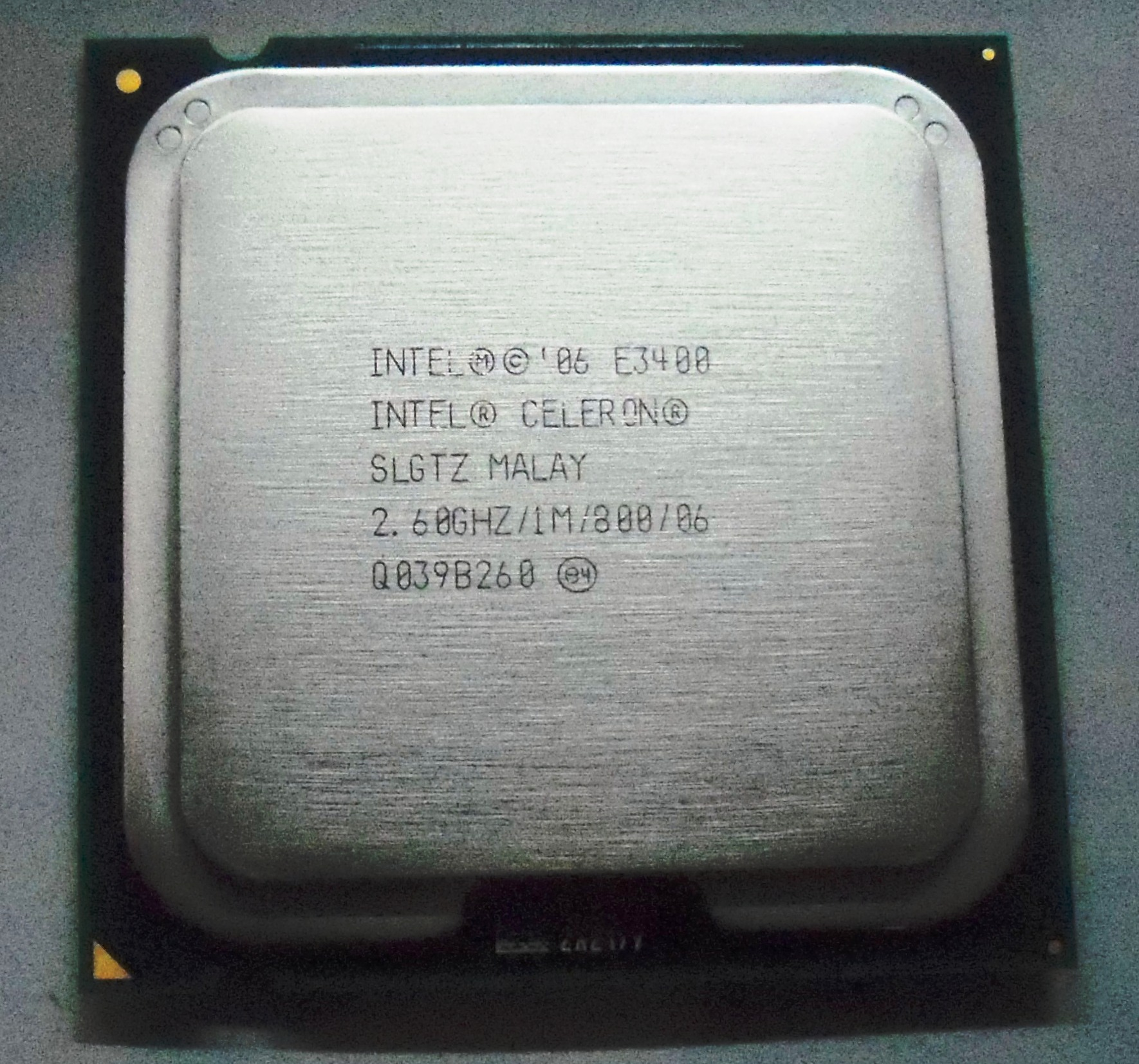 Procesador Intel Celeron E3400 sk775 LGA